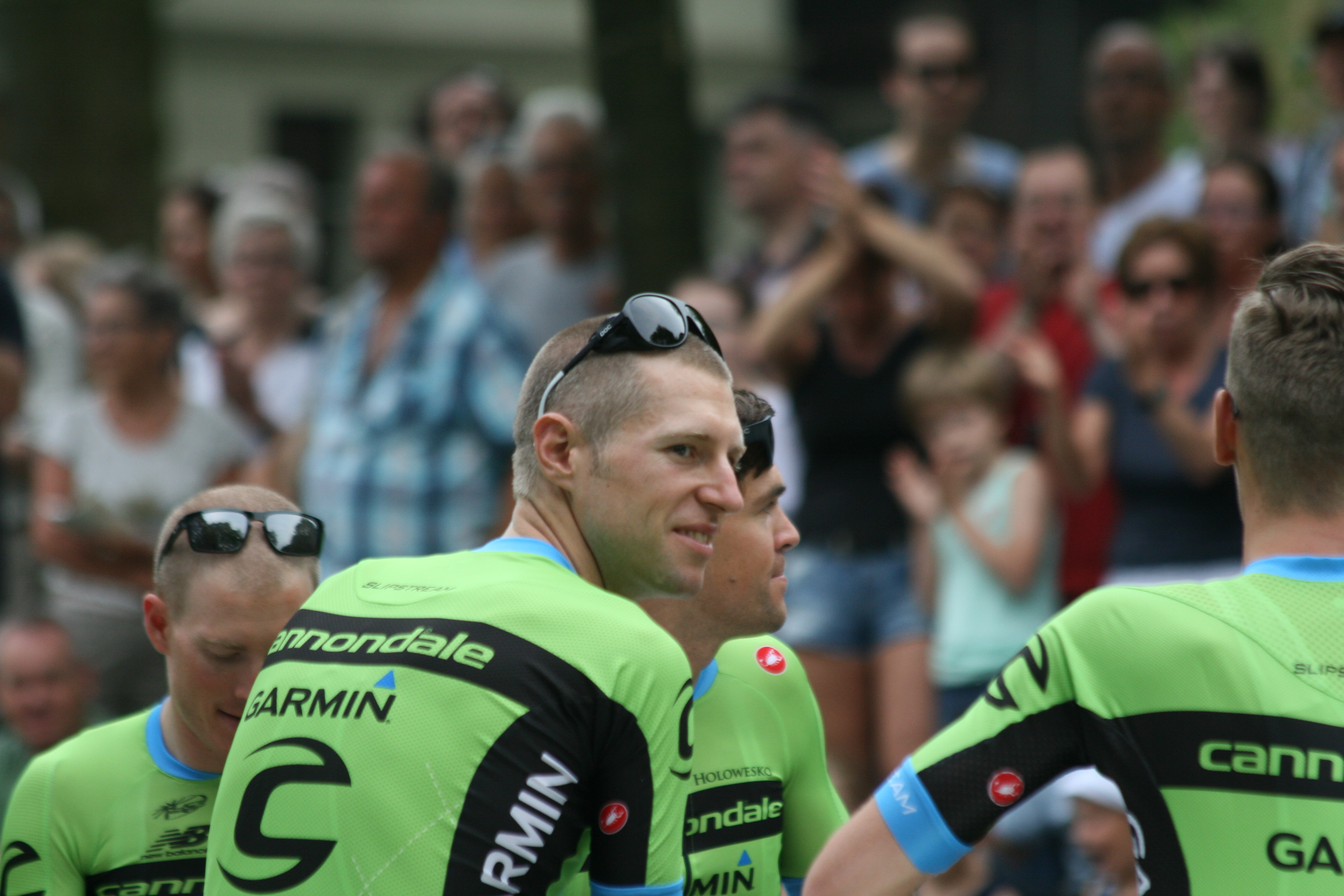 ploegenpresentatie Tour de France 2015 Utrecht